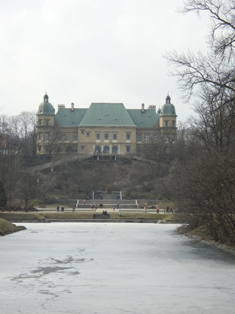 Zamek Ujazdowski od strony Wisły